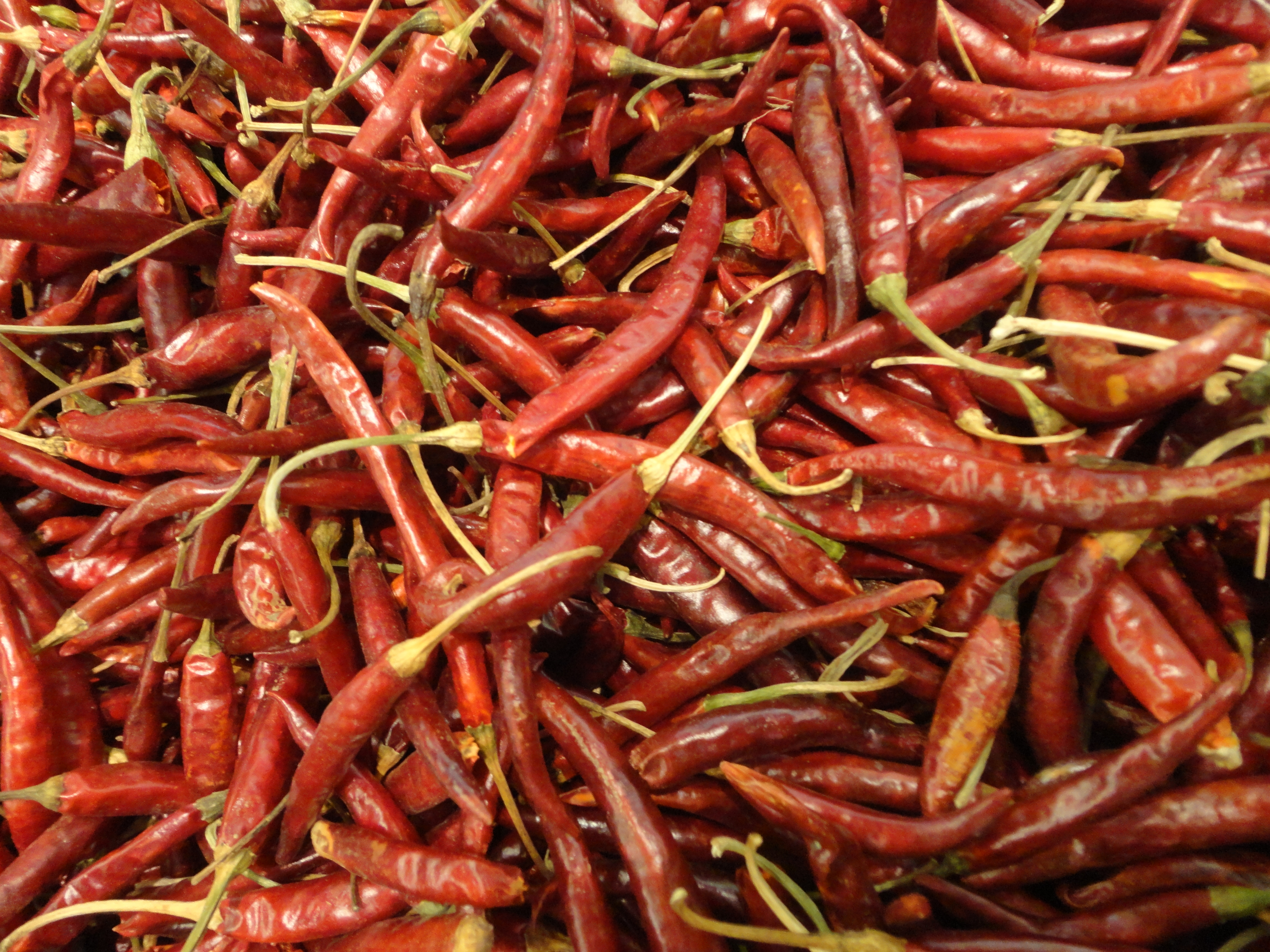 tree chili Chile de Árbol seco